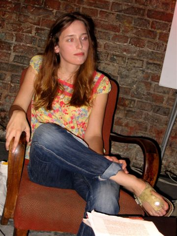 Joanna Wajs (b. 1979), Polish poet